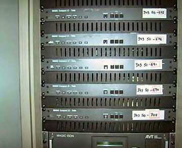 Motiv: AVT Magic ISDN Dateiname: 102-0280_IMG.JPG Aufnahmedatum: 2001